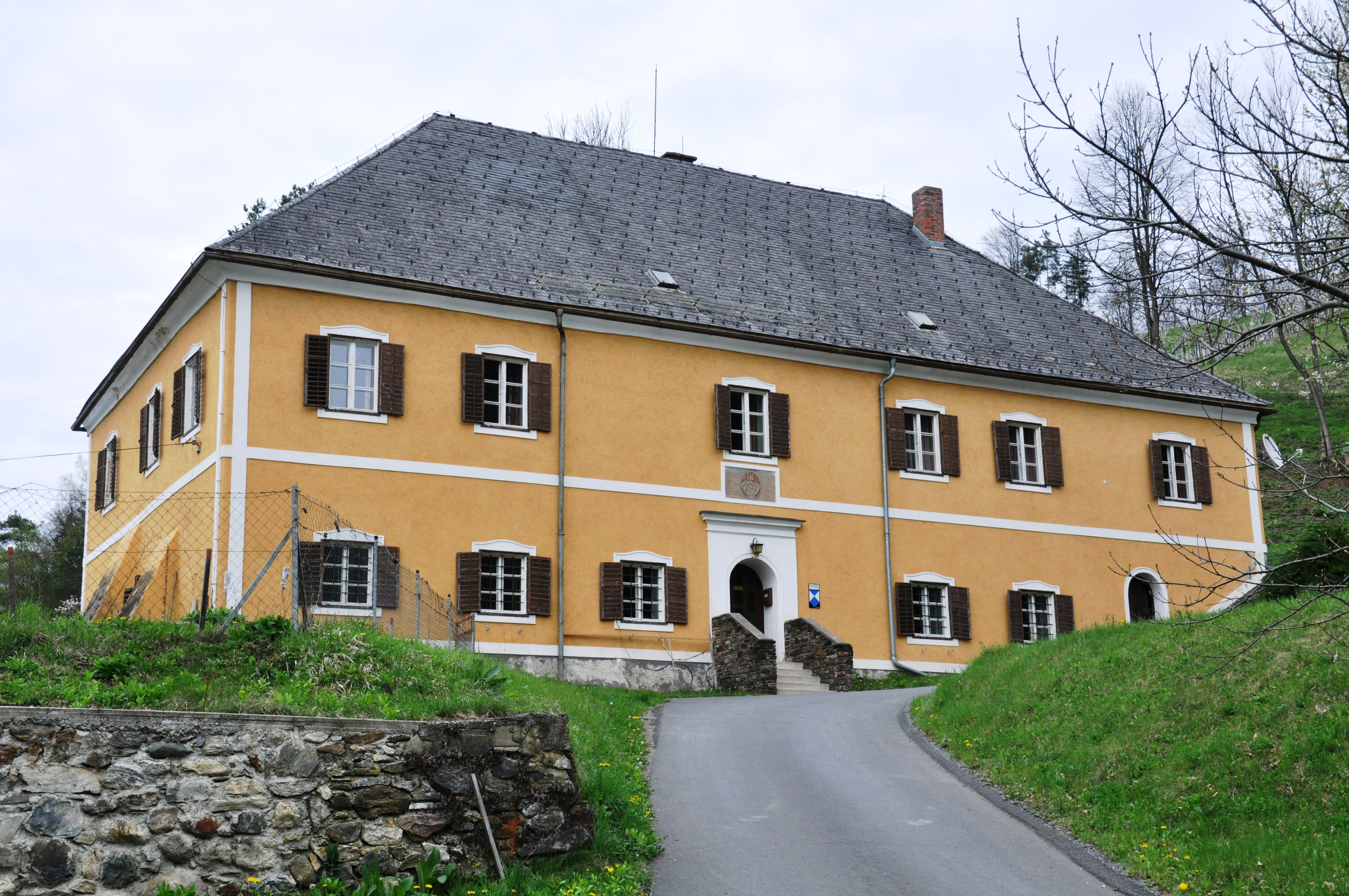 Pfarrhof